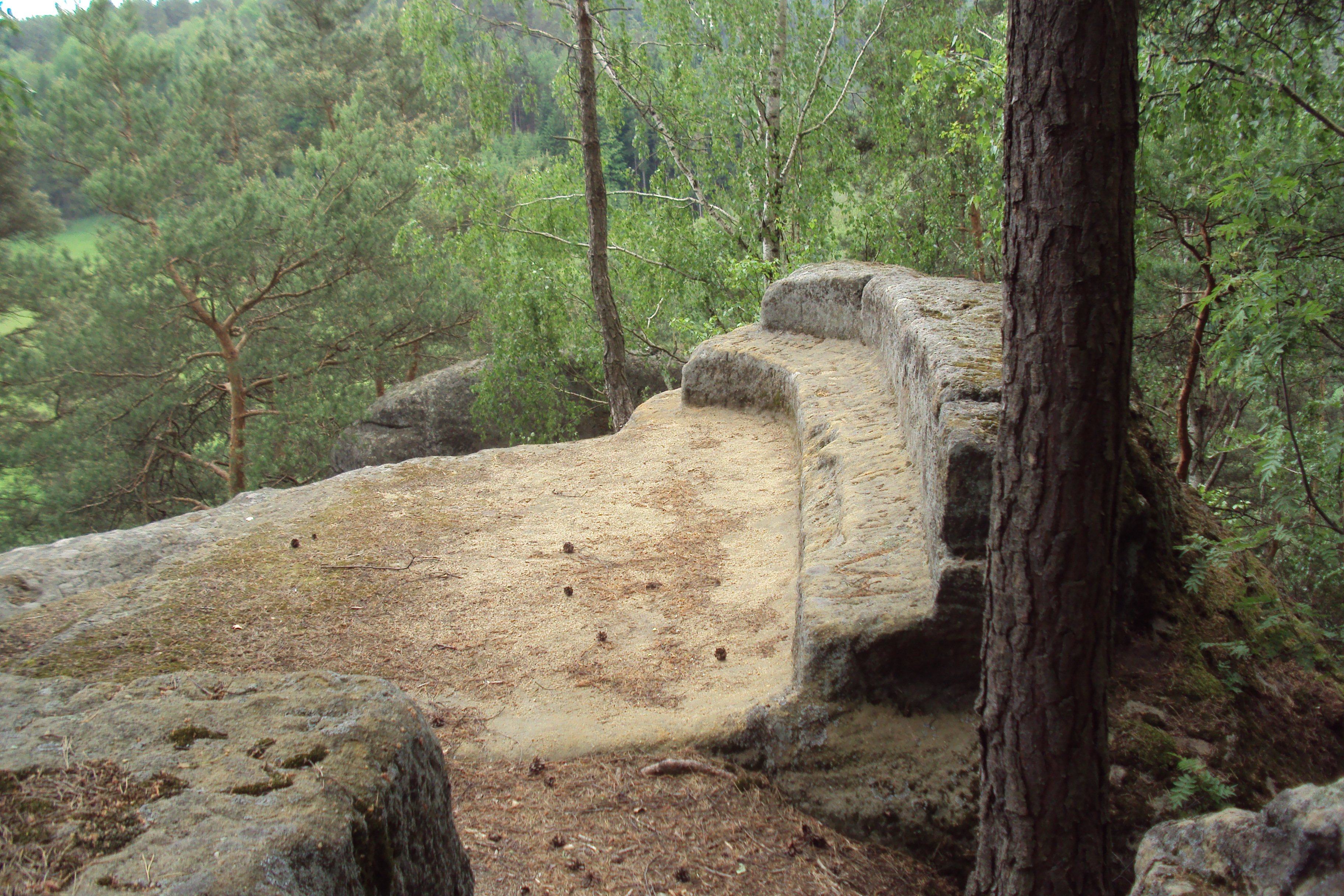 Horní část Velenických Laviček